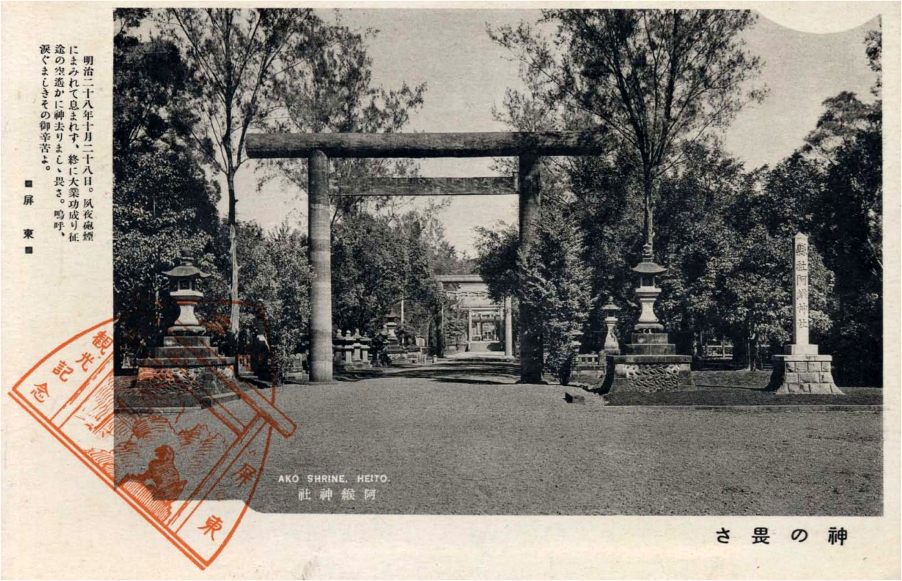 中文（台灣）: 阿緱神社，位於屏東公園北側，現為屏東體育場